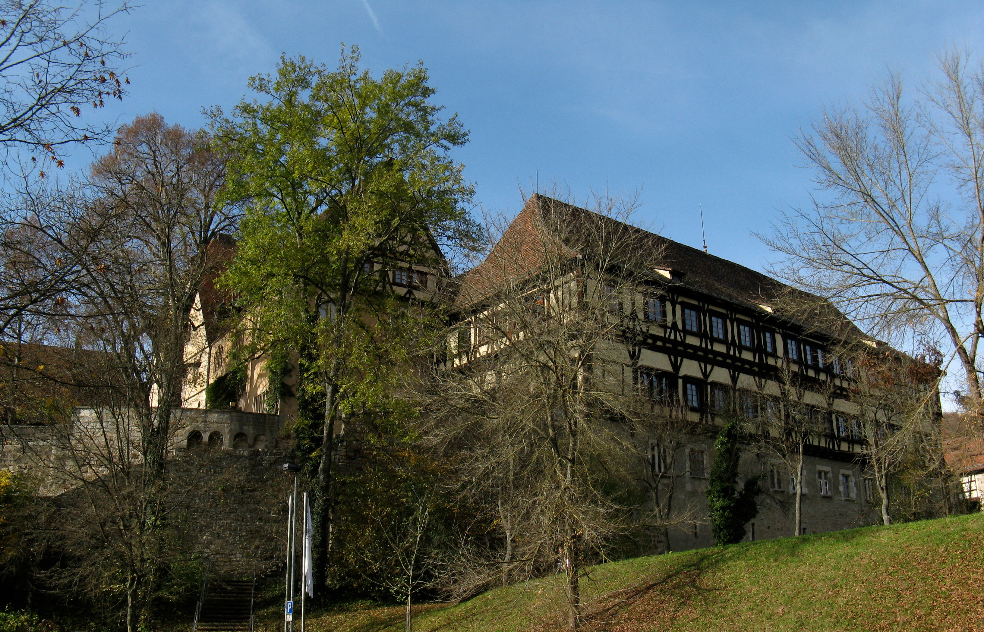 Kloster Bebenhausen: Außenansicht vom Parkplatz